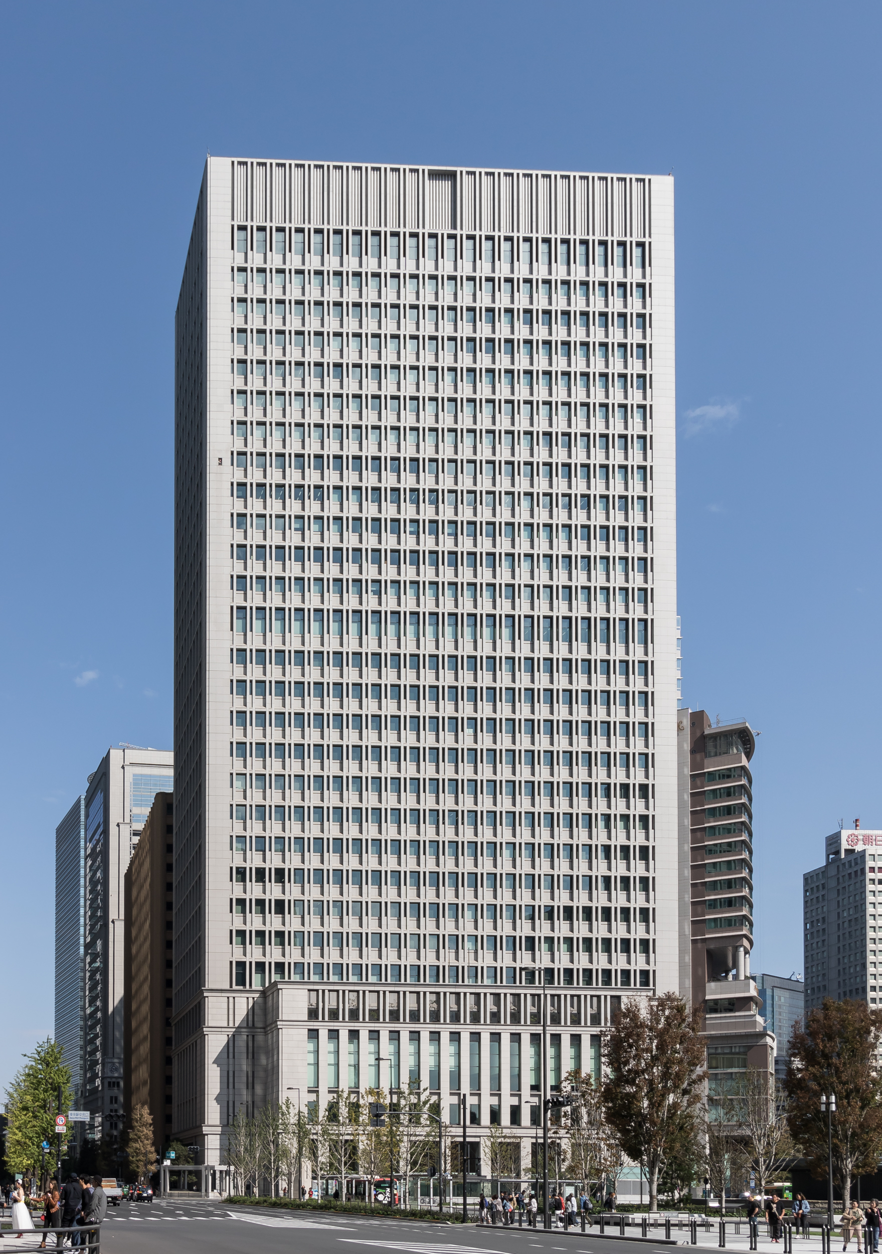 日本生命東京本部、日立製作所本社